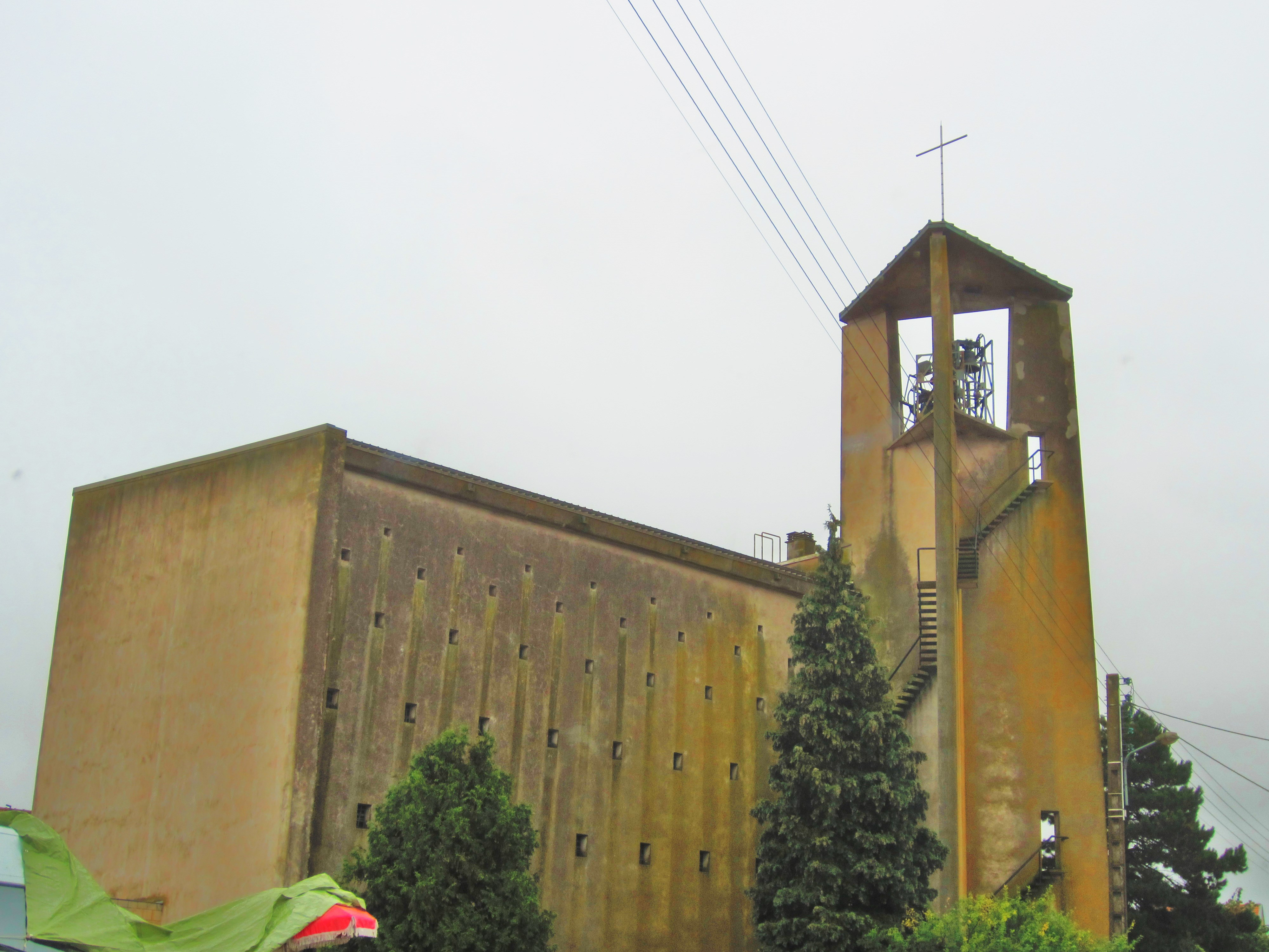 Moyenvic Église Saint-Pient